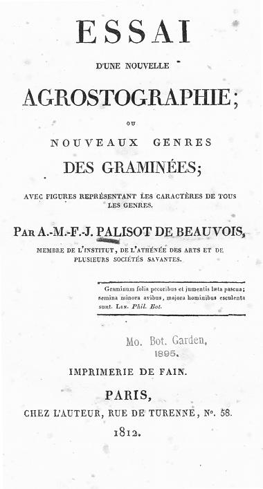 page de couverture de « Essai d'une nouvelle agrostographie », ouvrage de botanique paru en 1812 à Paris, auteur : Ambroise Marie François Joseph Palisot de Beauvois.